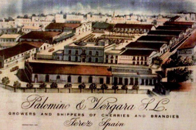 Räumlichkeiten von Palomino & Vergarra, Jerez de la Frontera